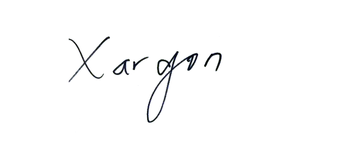 Xargon0731's signature